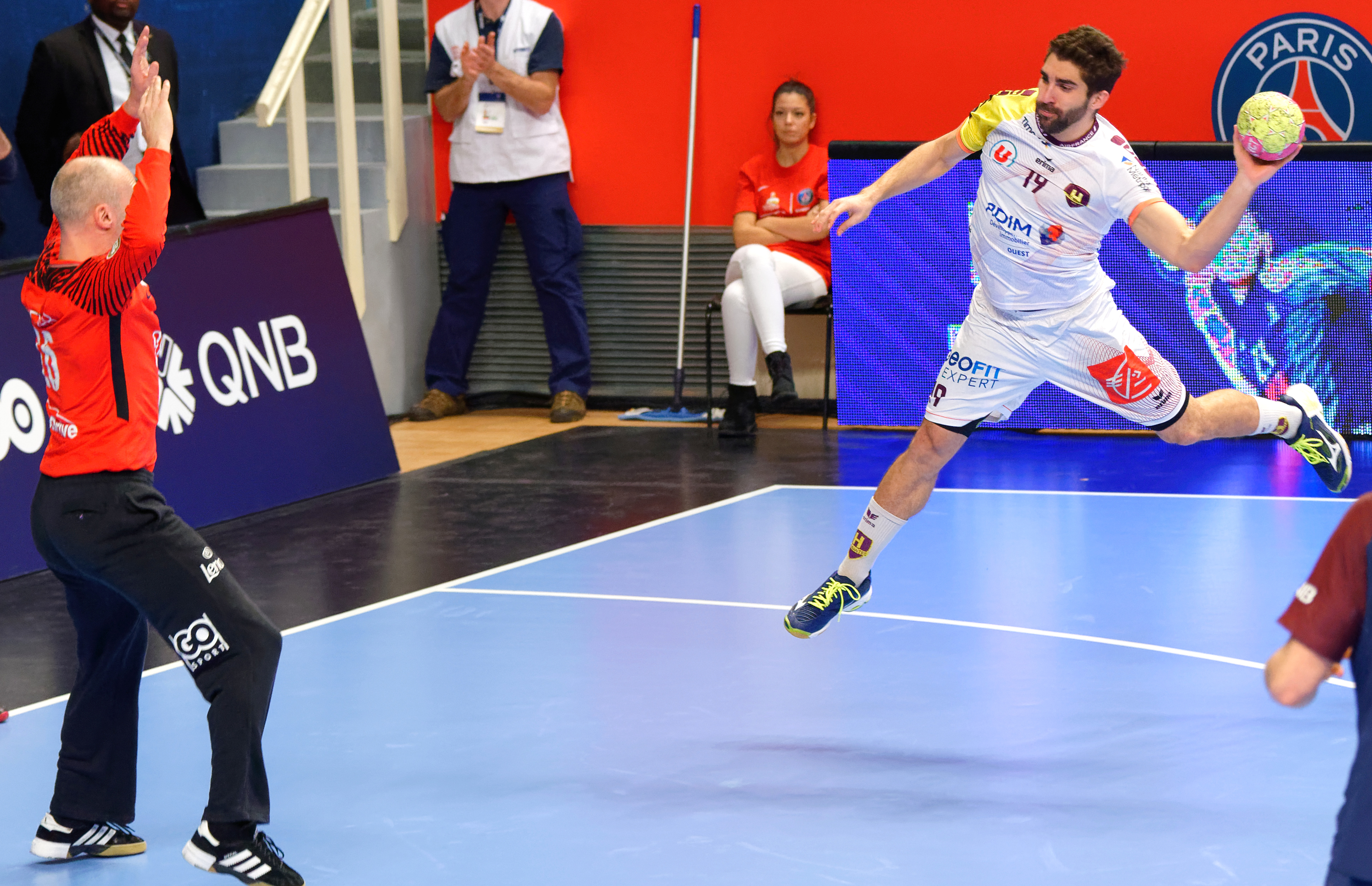 Quart de finale de la Coupe de la Ligue entre le PSG et le HBC Nantes. A Coubertin, le 14 décembre 2017.